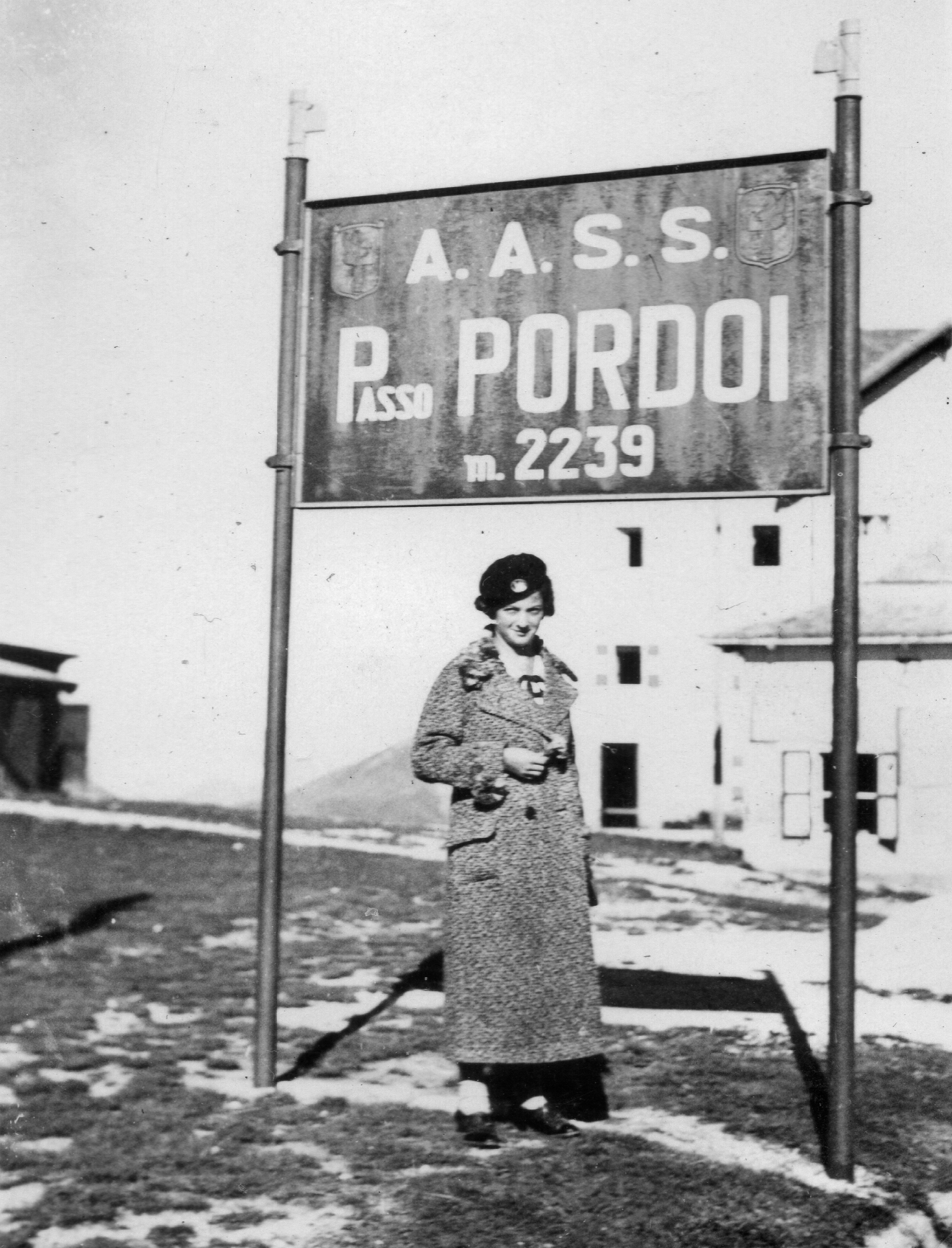 Pordoi-hágó. Location: Italy, Dolomiti Tags: portrait, lady, coat Title: Pordoi-hágó.